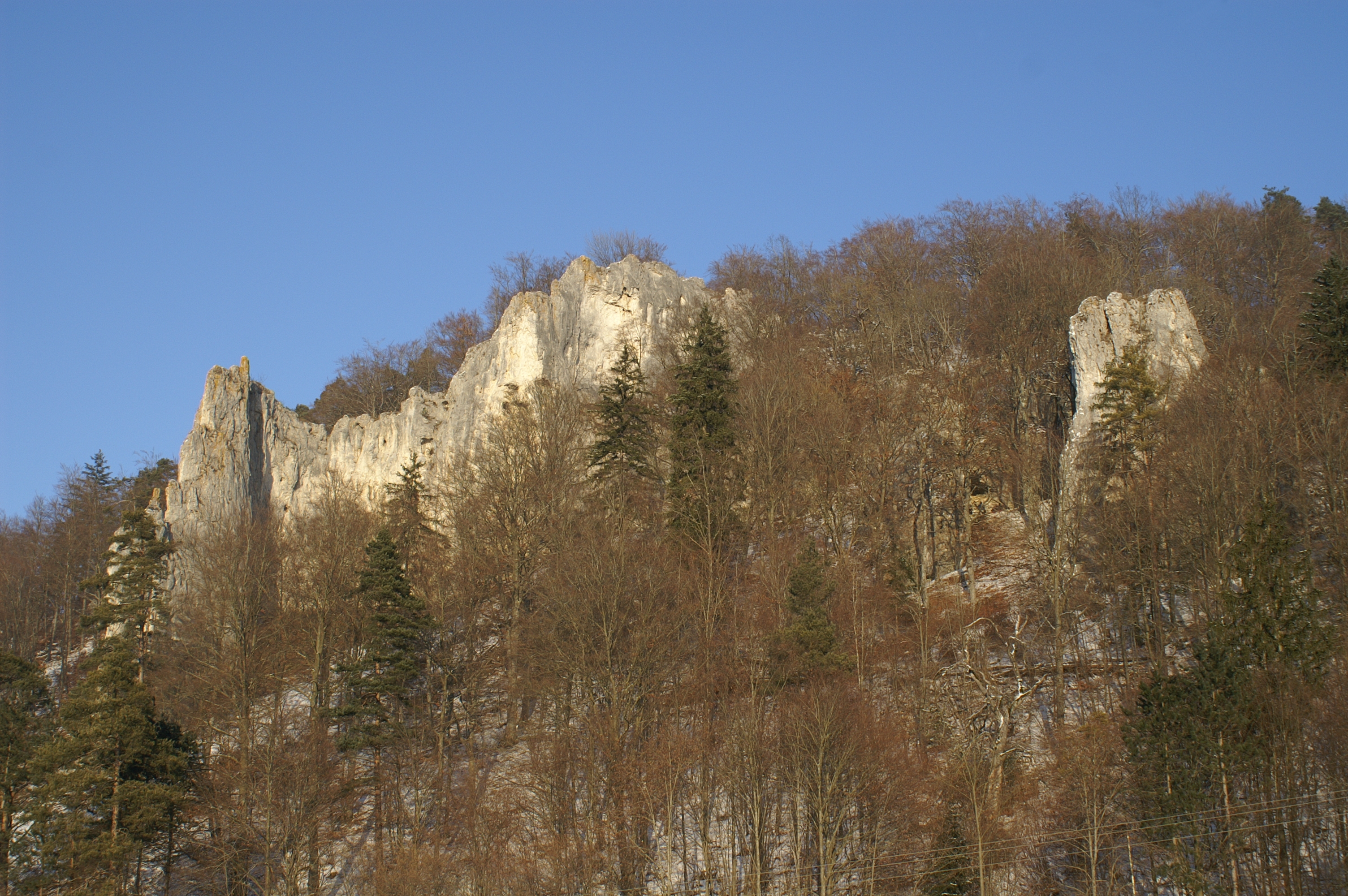 Im Bruckfelsmassiv befindet sich das Geißenklösterle, eine bedeutende archäologische Fundestelle